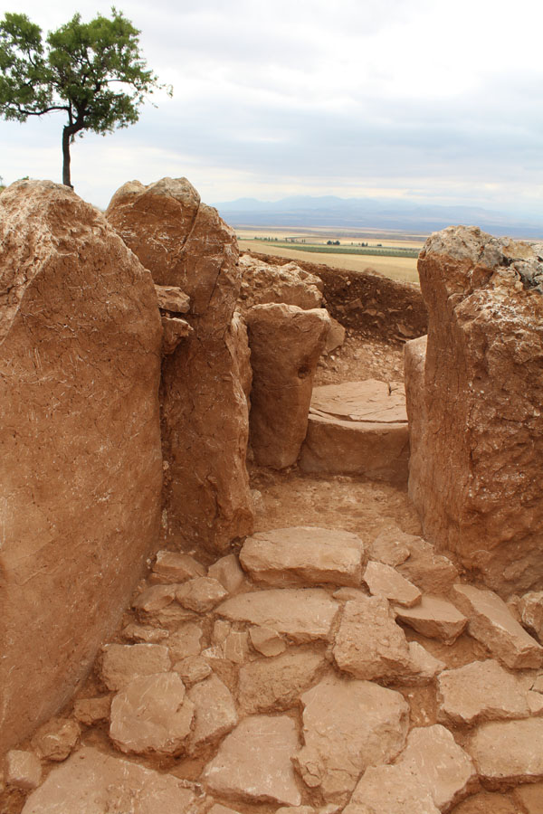 Sepultura 10 de la necrópolis megalítica de Panoría (Darro, Granada) y orientación desde la cámara funeraria